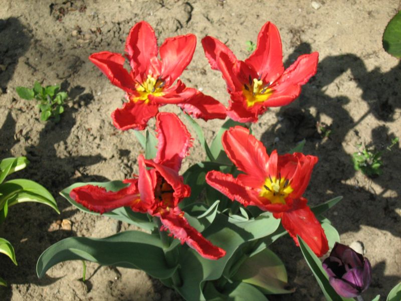 Tulipan - Tulipa gesneriana